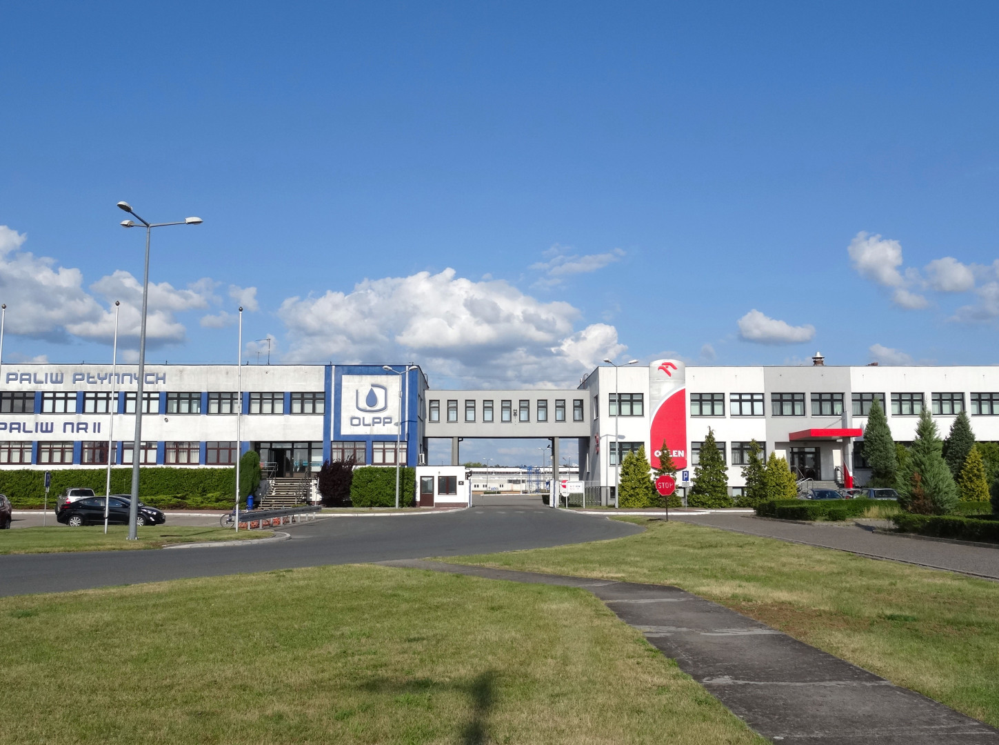 Operator Logistyczny Paliw Płynnych Zespół Baz Paliw nr 2 w Nowej Wsi Wielkiej, powiat bydgoski